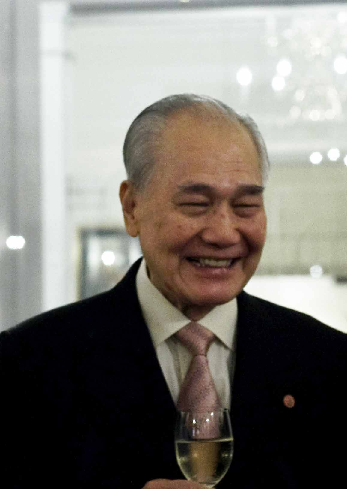 นายอานันท์ ปันยารชุน / นายกรัฐมนตรีร่วมงานถวายเลี้ยงพระกระยาหารค่ำแด่สมเด็จพระเทพรัตนราชสุดาฯ สยามบรมราชกุมารี ในโอกาสที่ผู้บริหาร British Council เยือนประเทศไทย 12 มกราคม2553 (The Official Site of The Prime Minister of Thailand Photo by พีรพัฒน์ วิมลรังครัตน์)